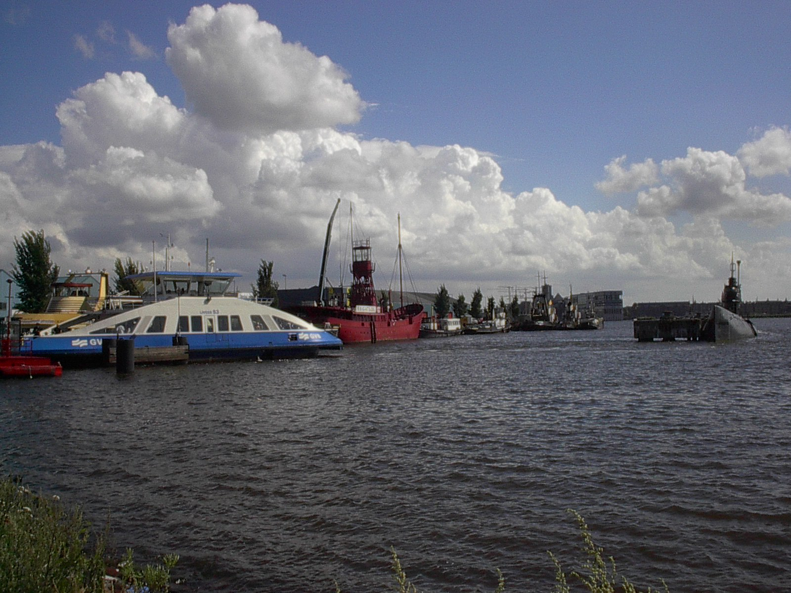 NDSMveer bij NDSM-werf, Het IJ, Amsterdam